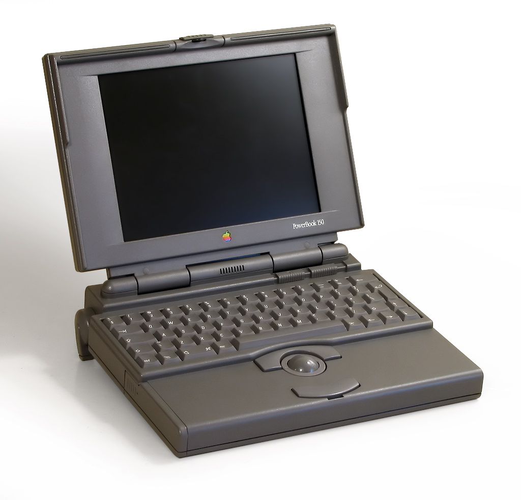 Apple Powerbook 150.